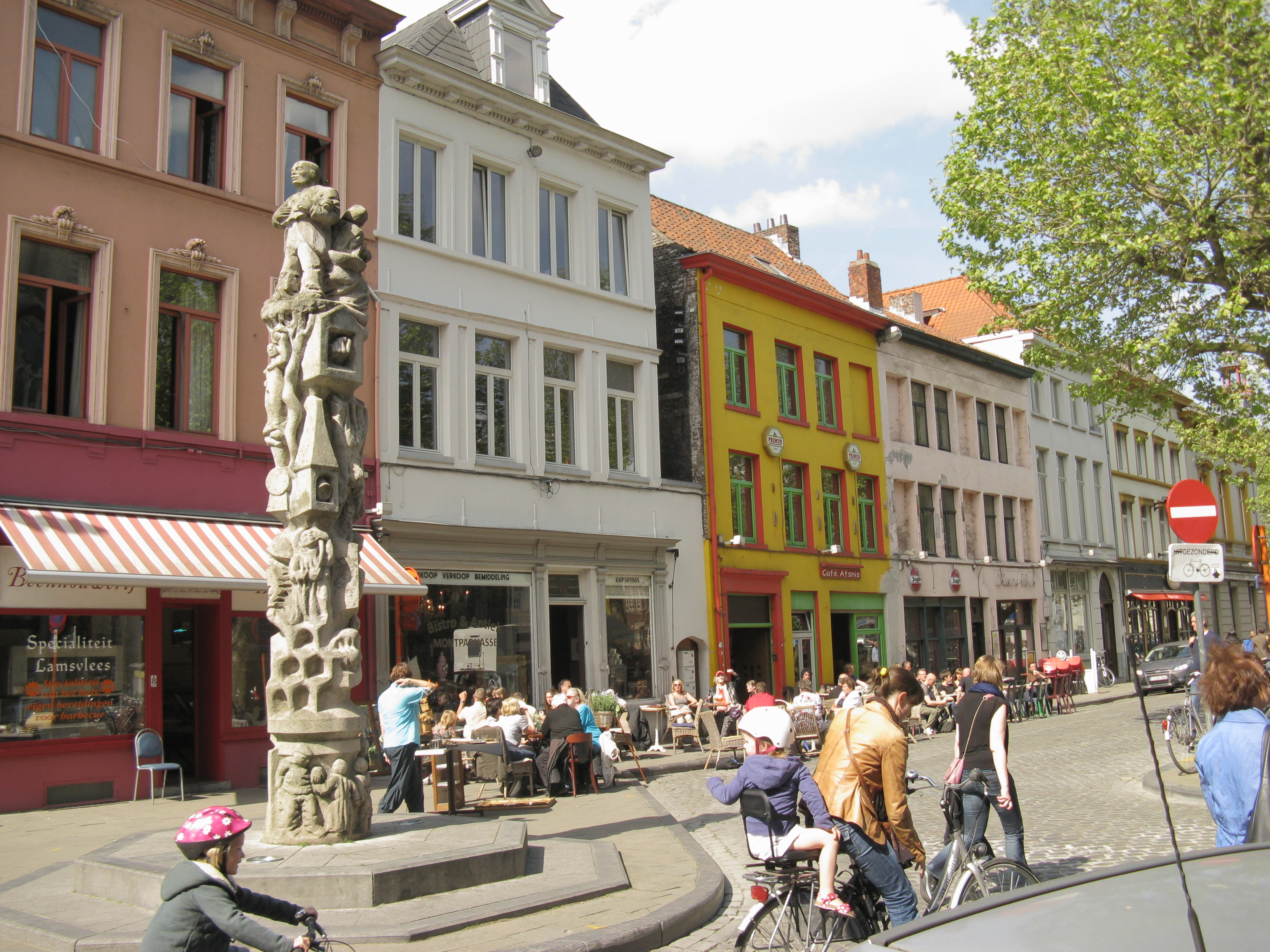 Het plein "Bij Sint-Jacobs" in Gent met beeldhouwwerk "Karel Waeri" door Walter De Buck.